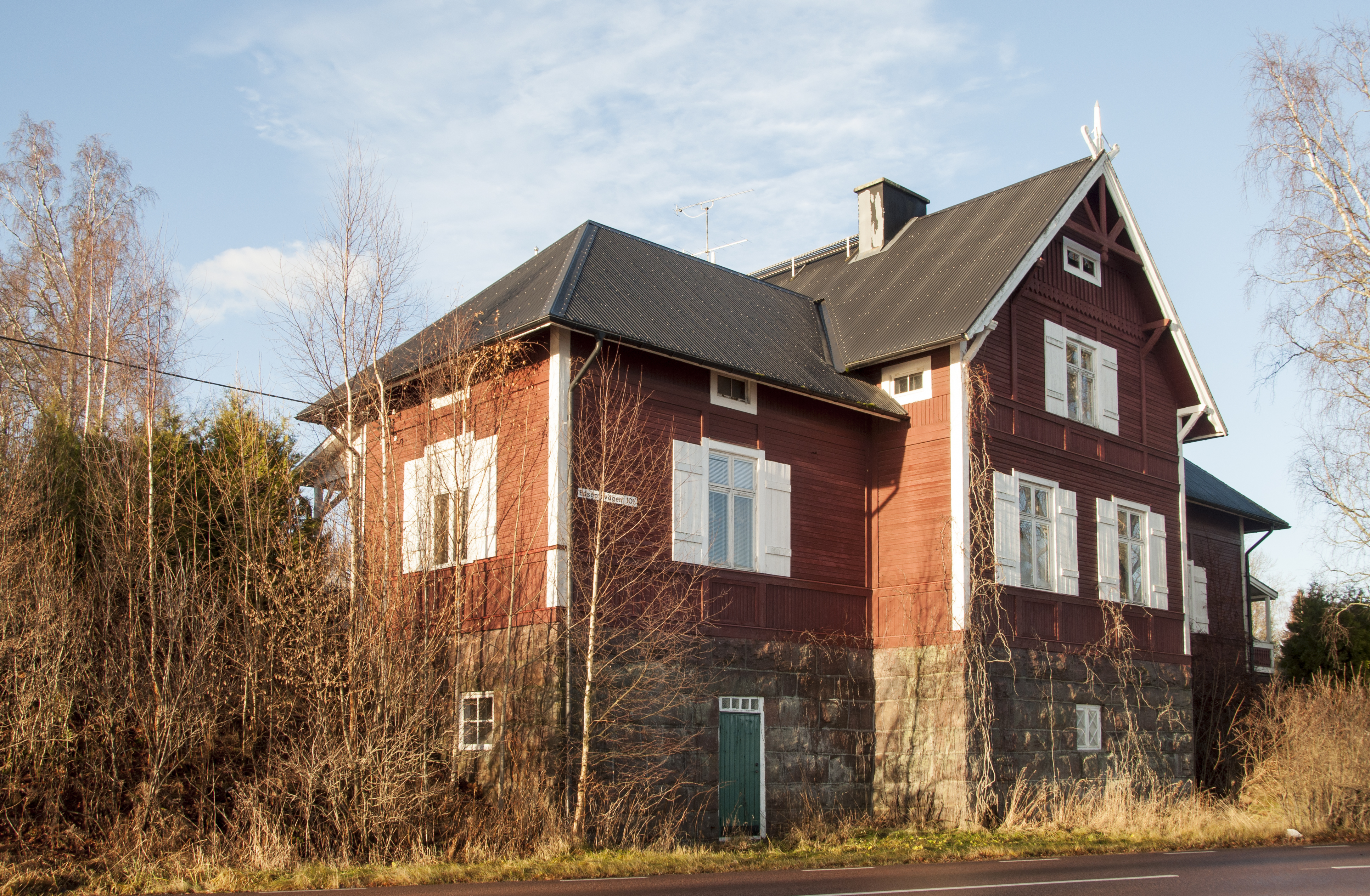 Edsgatans station vid Karlstad–Munkfors Järnväg. Invigd 1904. Arkitekt troligen Erik Lallerstedt